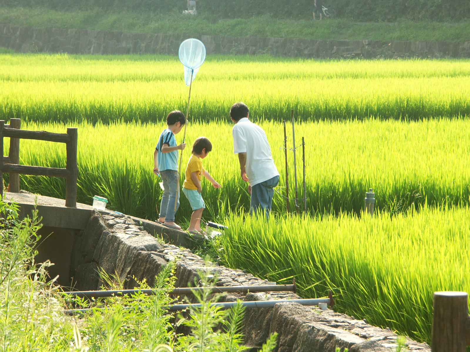 田圃の情景。 Minolta DiMAGE A1